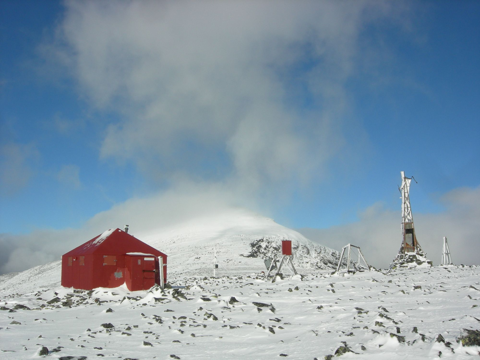 Axel Hambergs observatory (1910) and Bårddetjåhkkå (Pårtetjåkkå) summit (2005 m), Sarek National Park, Sweden